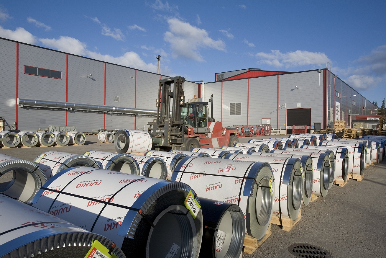 Рулоны стали с полимерным покрытием Pural на заводе в Ruukki в Канкаанпяа (Финляндия).